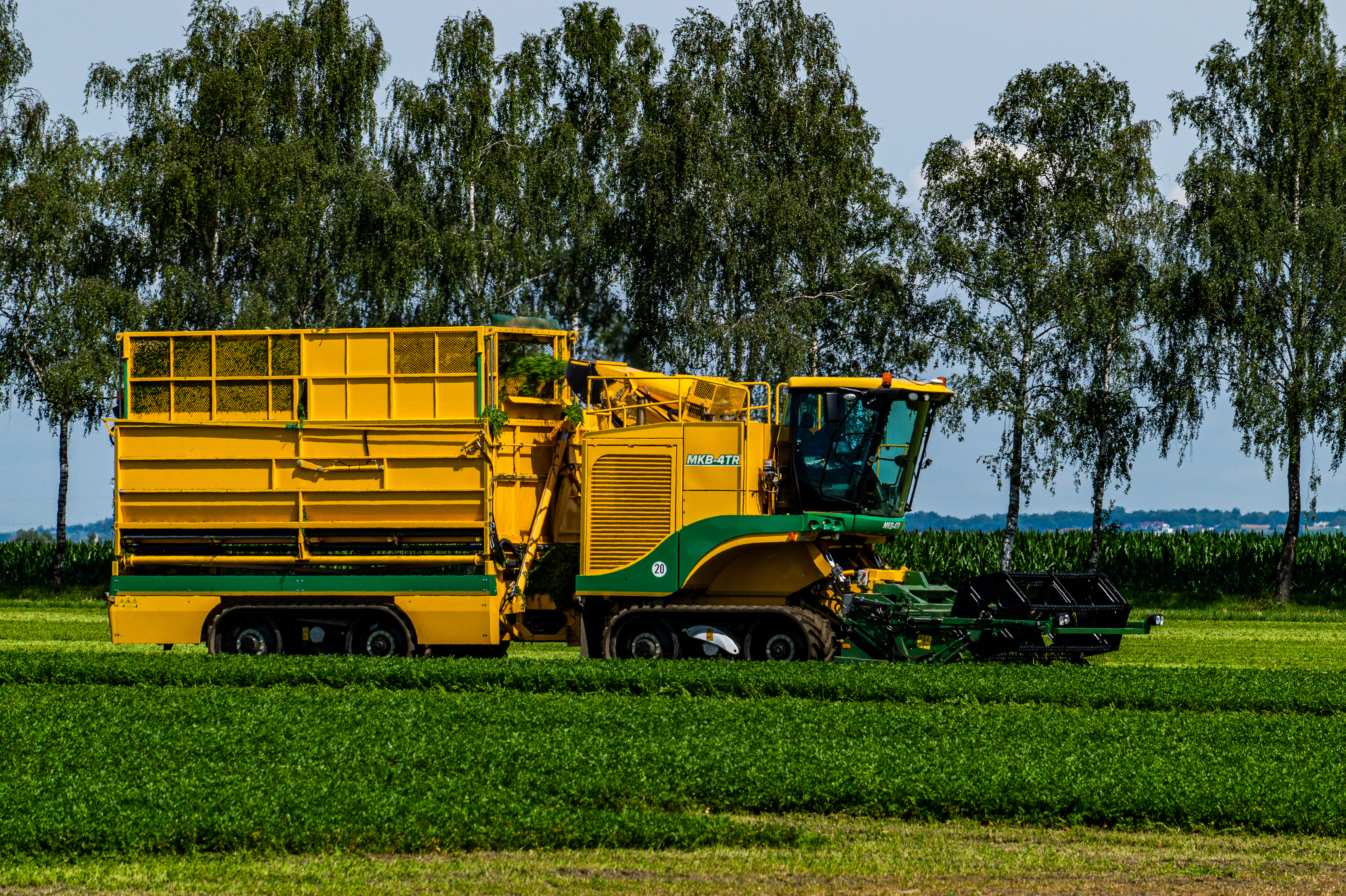 Ploeger MKB-4TR bei der Ernte von Kräutern